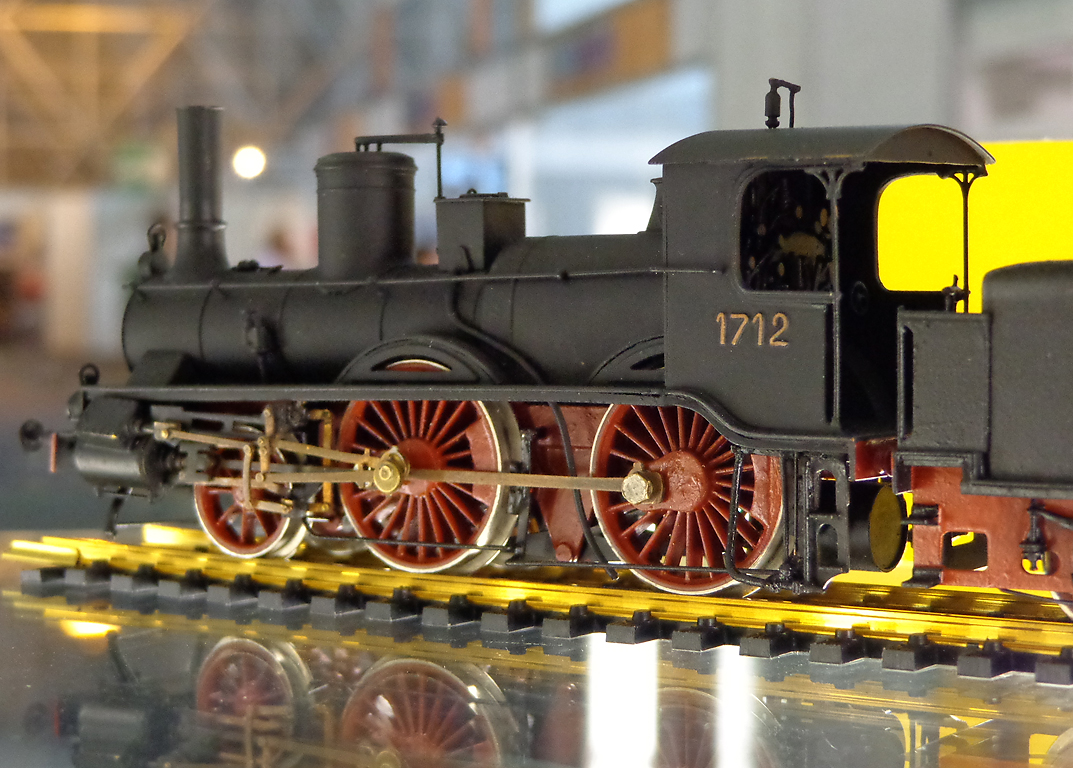 Modello artigianale in scala H0 della locomotiva FS 1712 (gruppo 170), esposto a Hobby Model Expo 2012